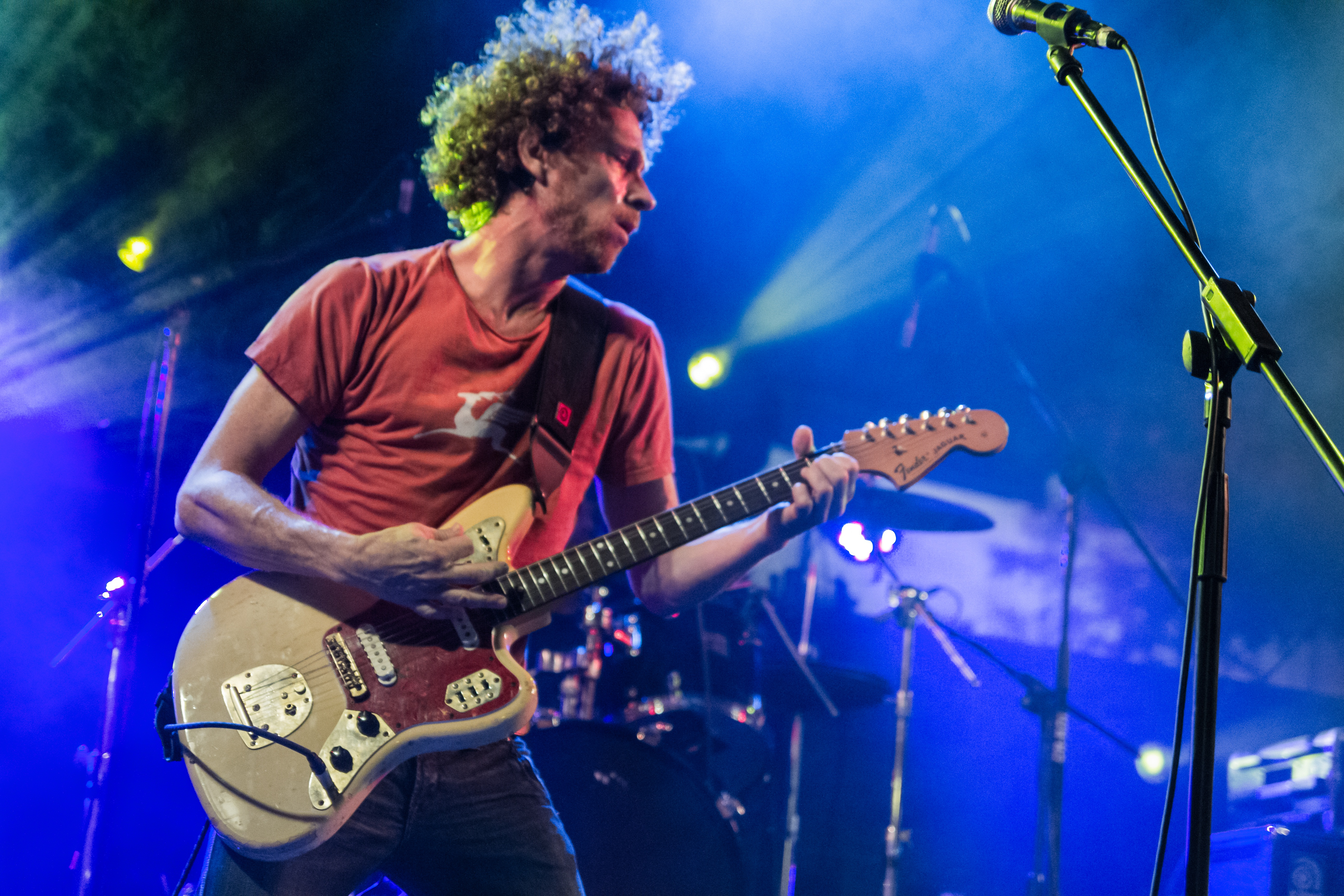 ירמי קפלן בהופעה. התמונה צולמה בפסטיבל אומנות תרבות רחוב בחיפה